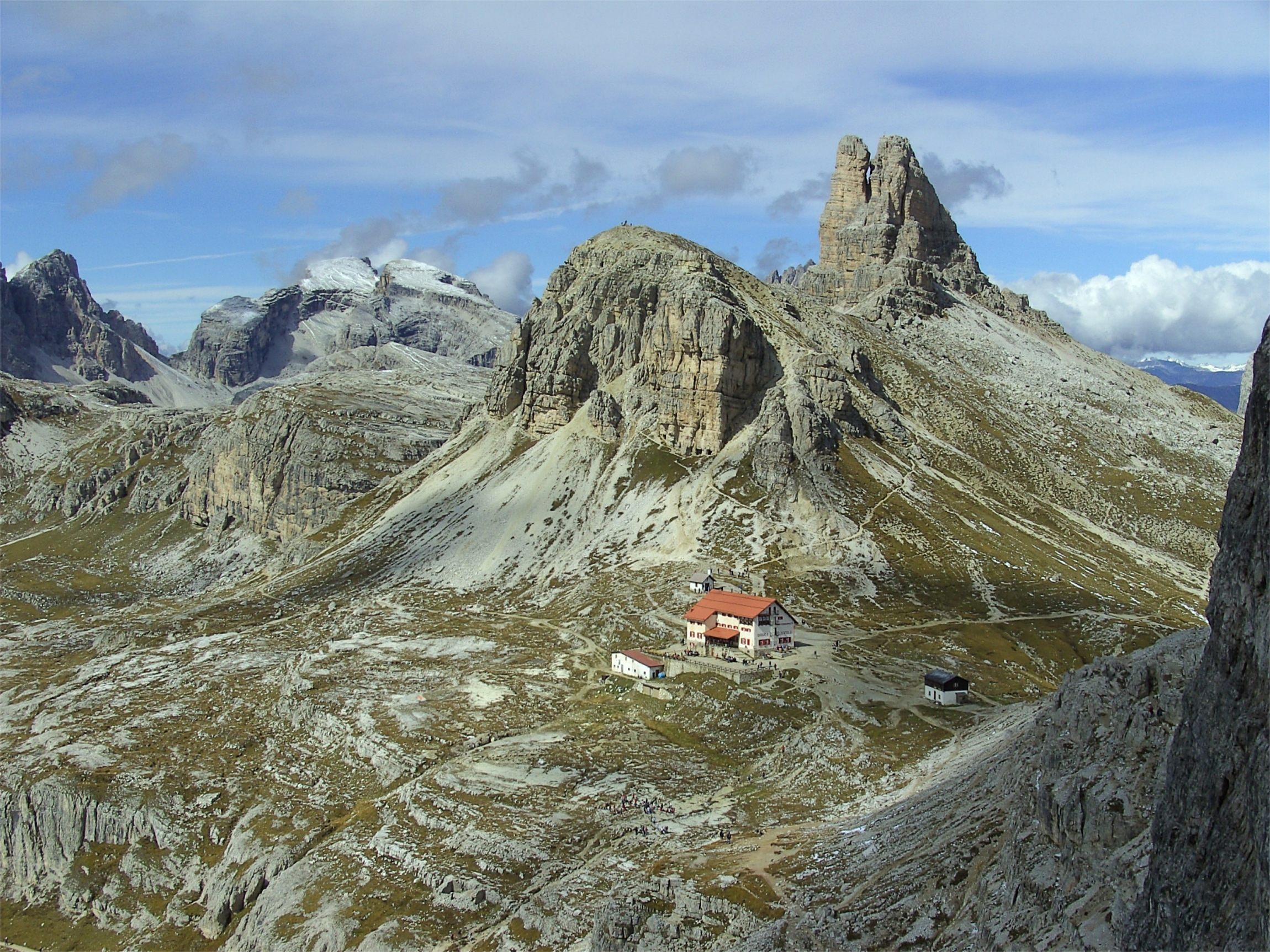 Die Drei Zinnen Hütte von den Befestigungen aus dem Ersten Weltkrieg aus gesehen. Sextener Stein, Toblinger Knoten